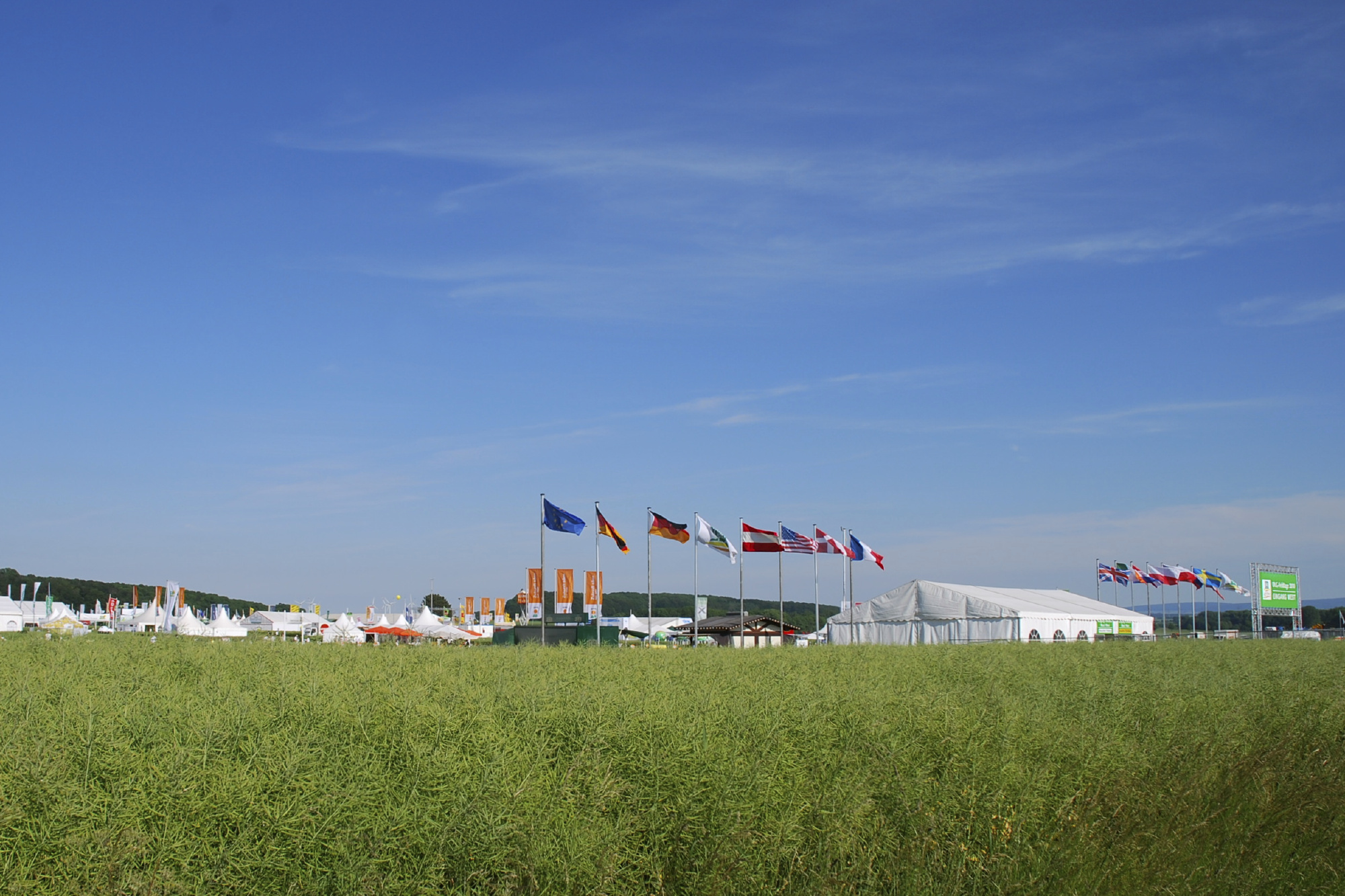 Blick übers Messegelände am Eingang West (rechts im Bild), DLG-Feldtage 2010, Gut Bockerode, Springe-Mittelrode, Niedersachsen, Deutschland. Im Vordergrund Raps.